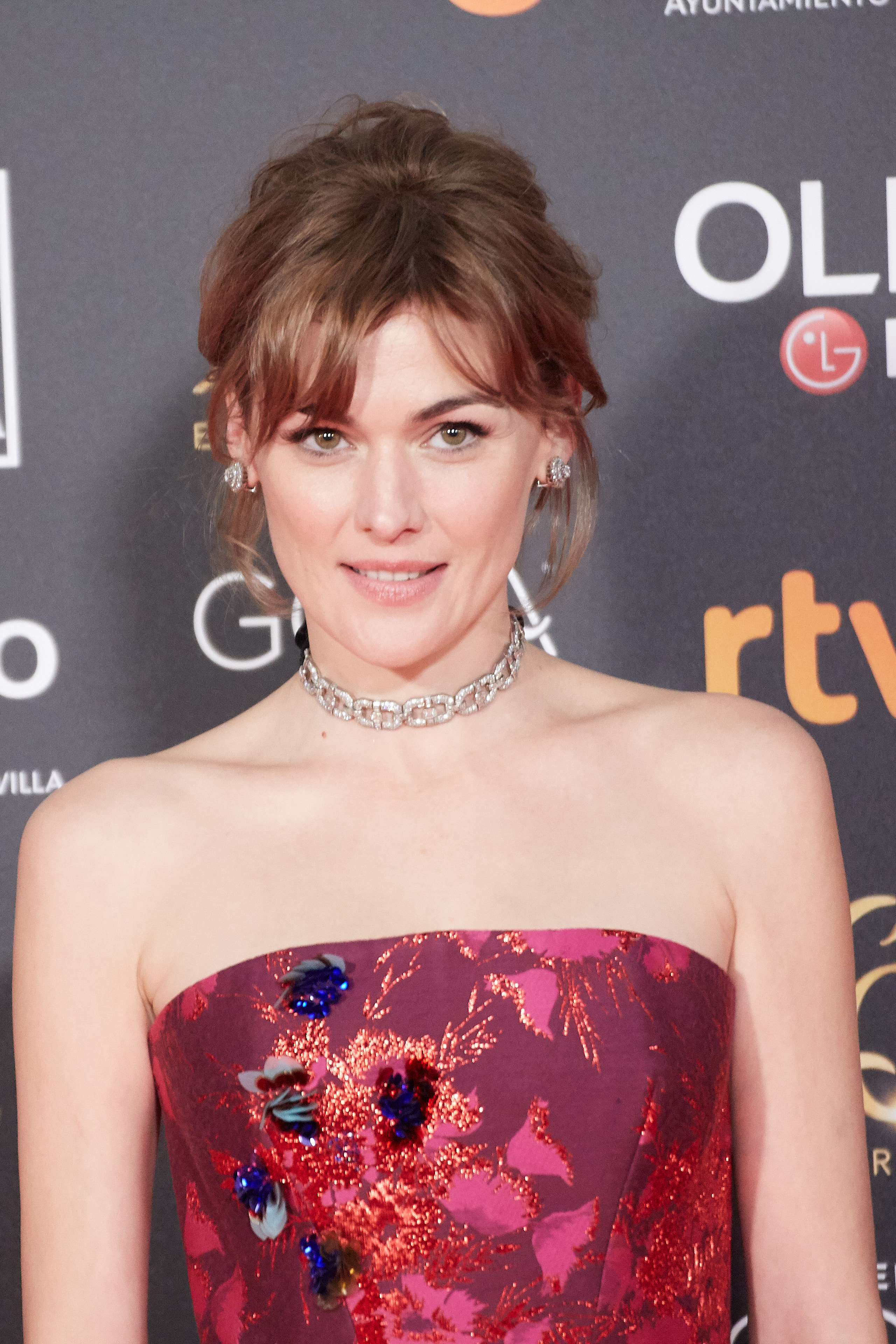 Marta Nieto en la alfombra roja de los Premios Goya celebrados en Sevilla en Febrero 2019